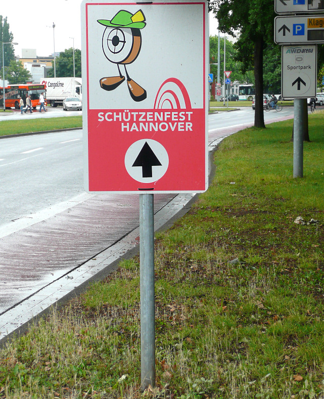 Anfahrtsschild Schützenfest